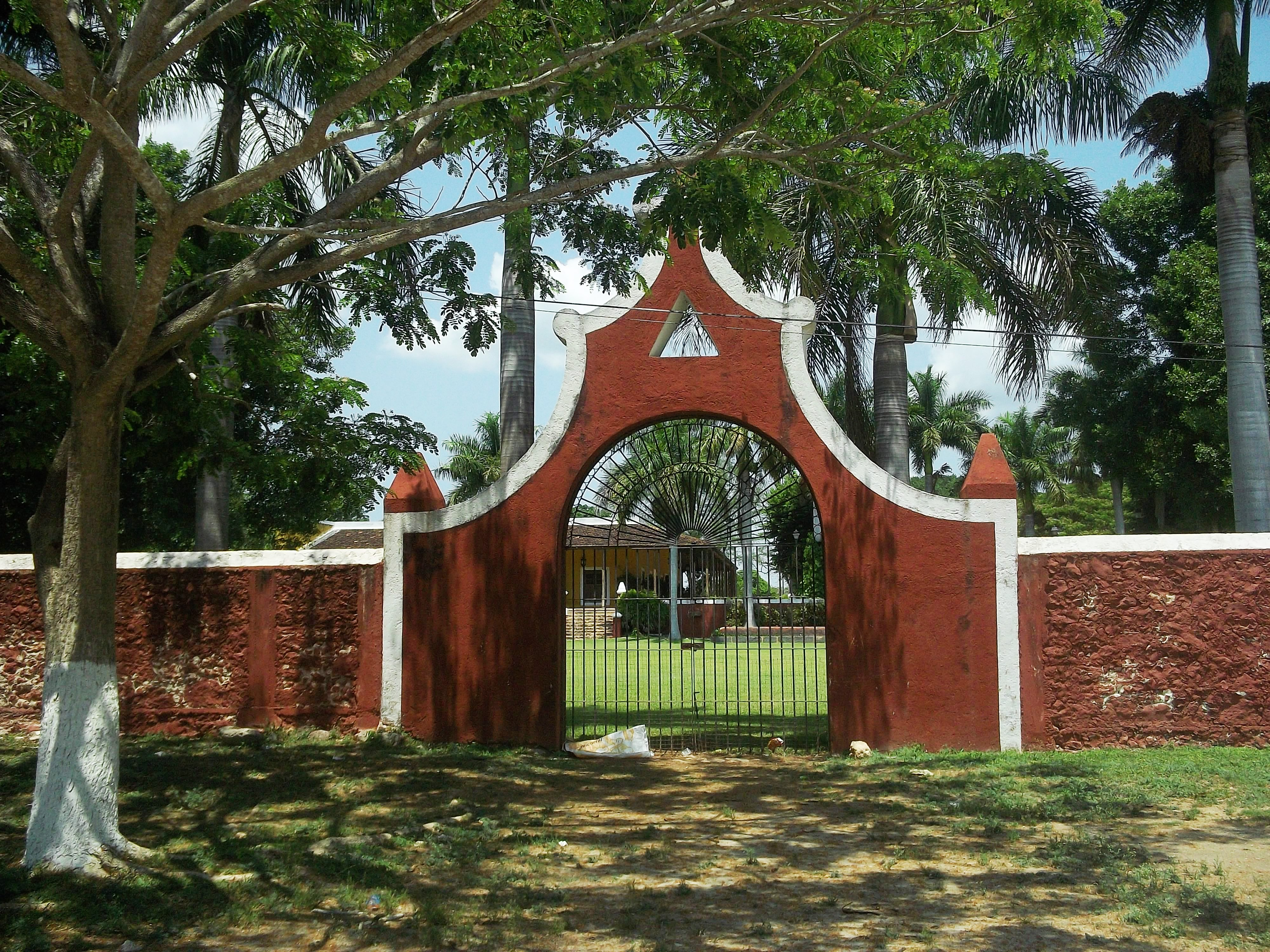 Hacienda de San Ignacio Tesip, Yucatán.